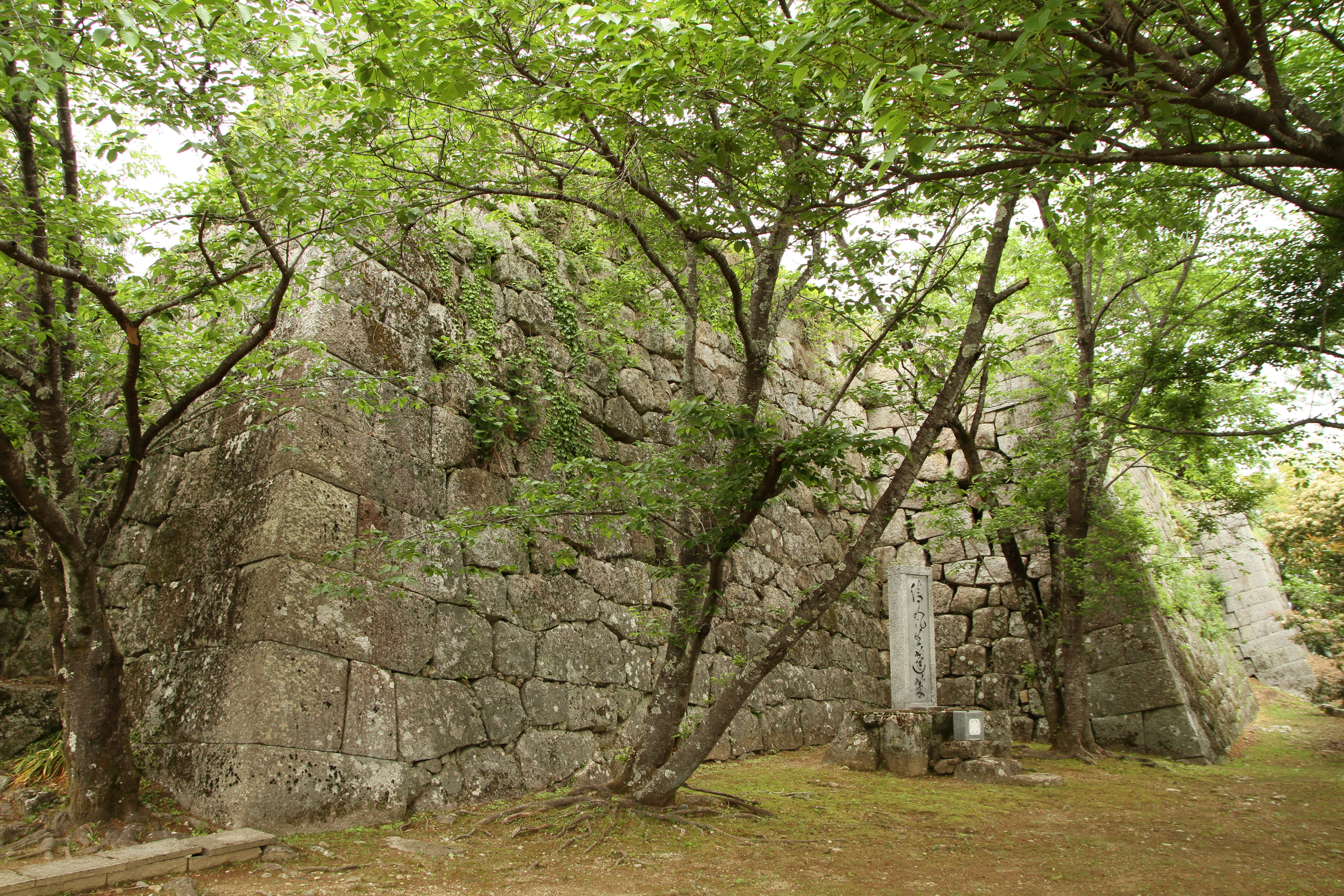 新宮城本丸の石垣